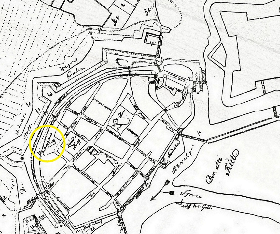 Plan Der Stadt Spandau Extra Moenia, Ausschnitt, gedreht (genordet), Moritzkirche markiert